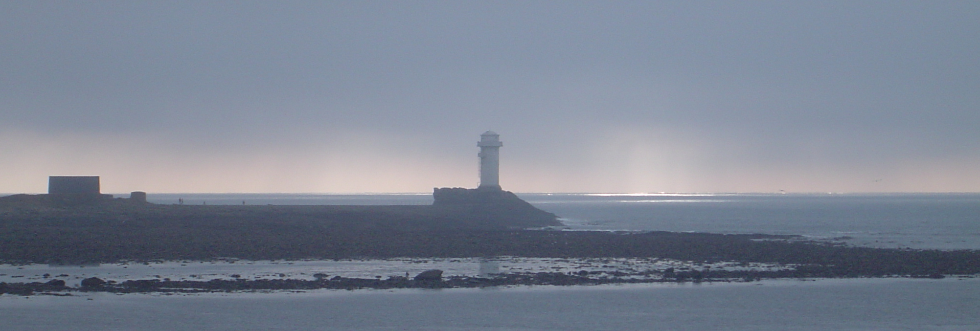 photo prise par moi-même en décembre 2005